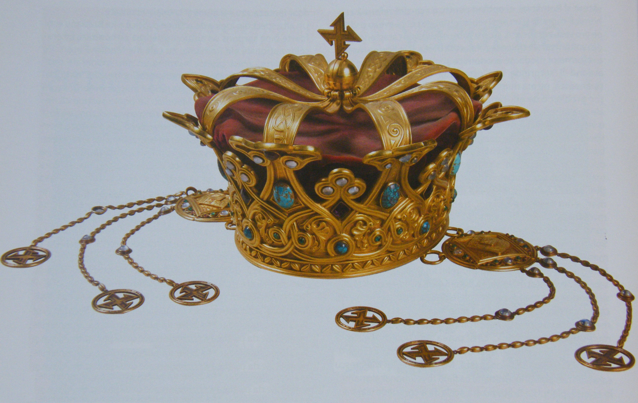 Coroana reginei Maria a România, folosită la încoronarea de la Alba Iulia din 15 octombrie 1922